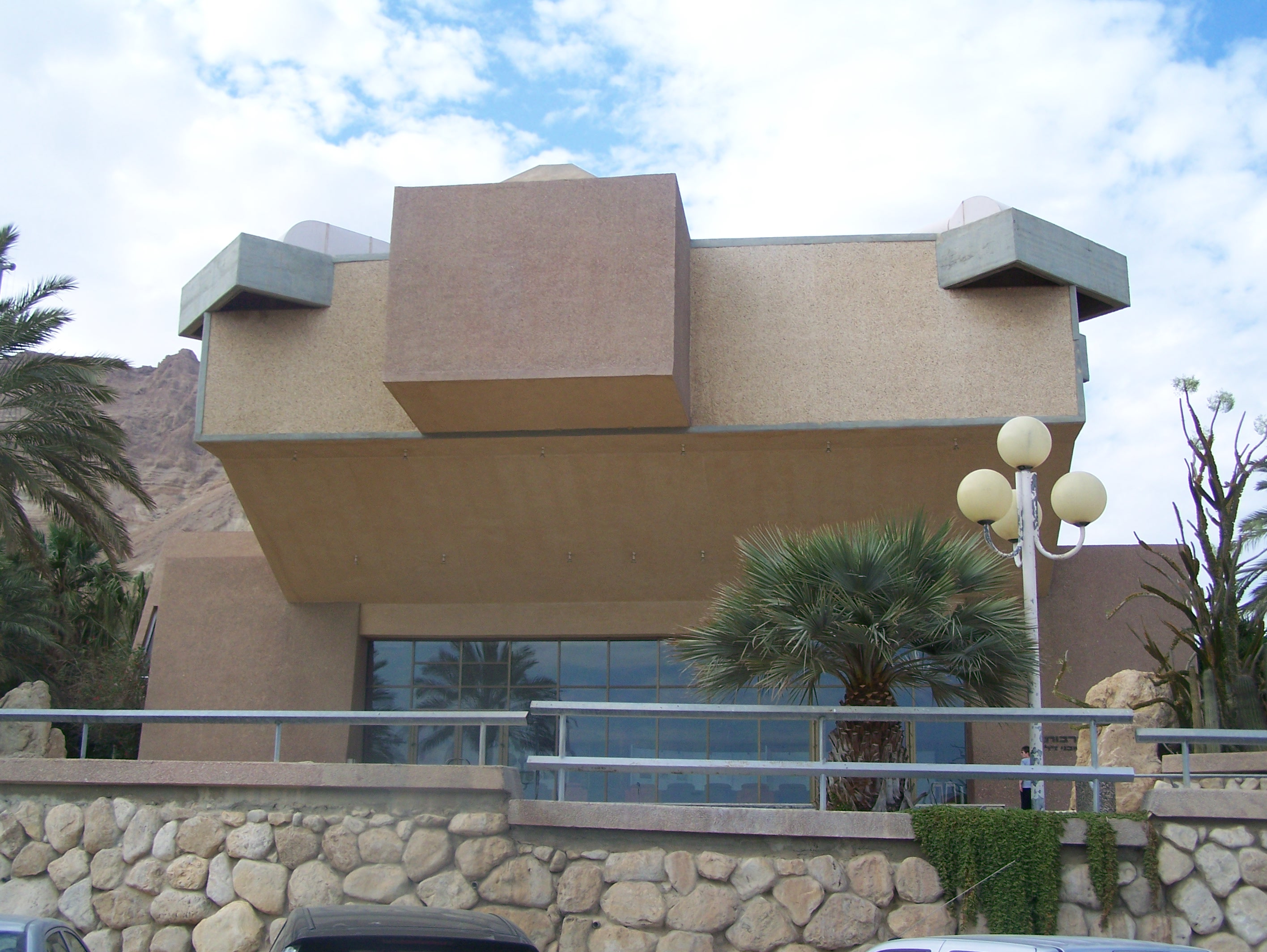 Kibbutz Ein Gedi